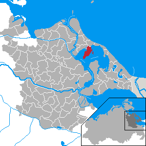 Lütow, Landkreis Ostvorpommern, Mecklenburg-Vorpommern